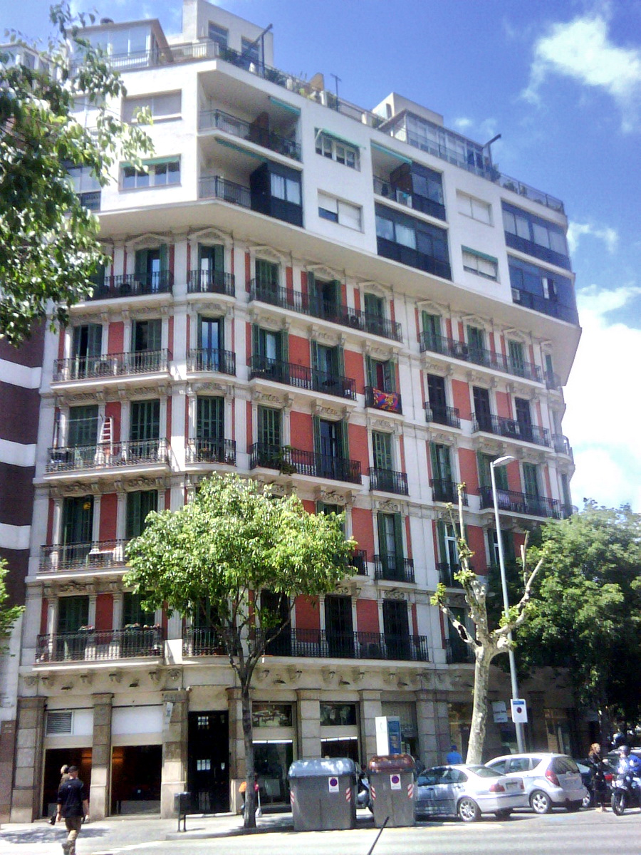 Casa amb remuntes fetes als anys 1960 al carrer Aragó 339 (Barcelona, Spain